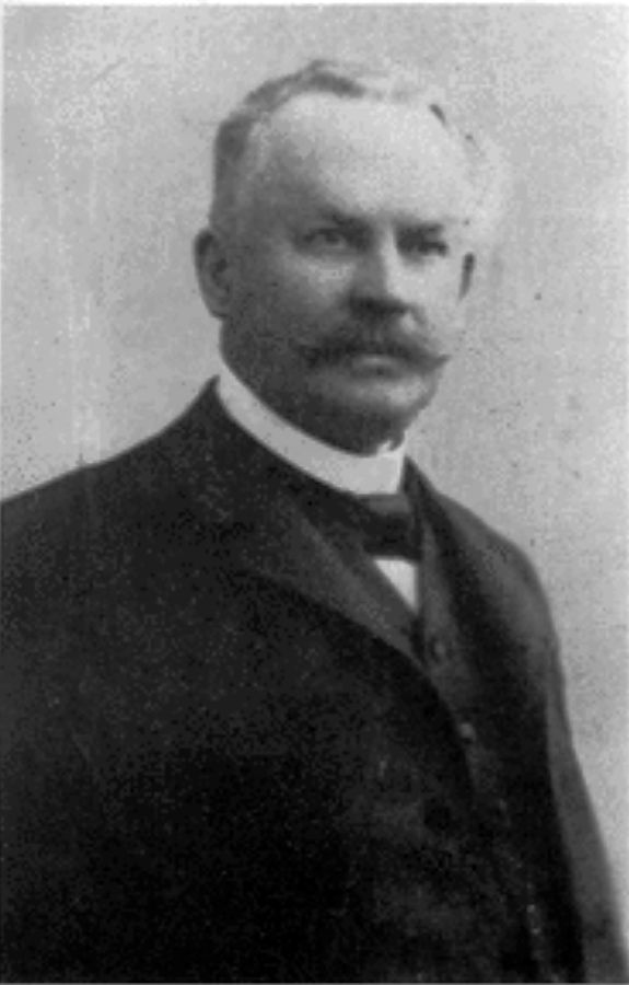 Porträtfotografie von Friedrich Heitmann (Fritz Heitmann) (1853-1921), Architekt in Königsberg (Ostpreußen)